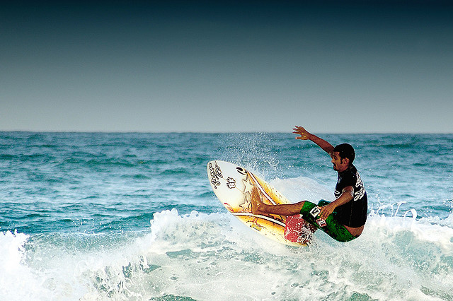 Maracaípe surfing